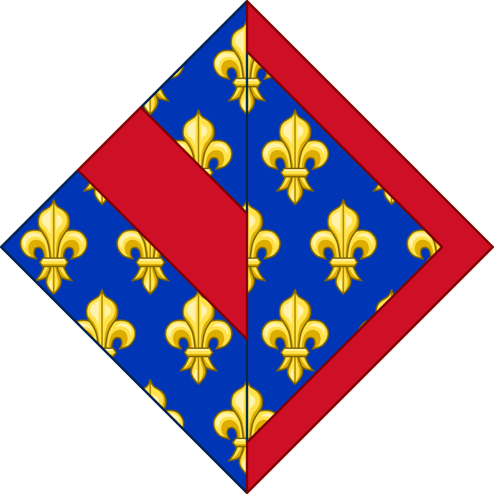 Armes d'Isabelle de Valois, duchesse de Bourbon